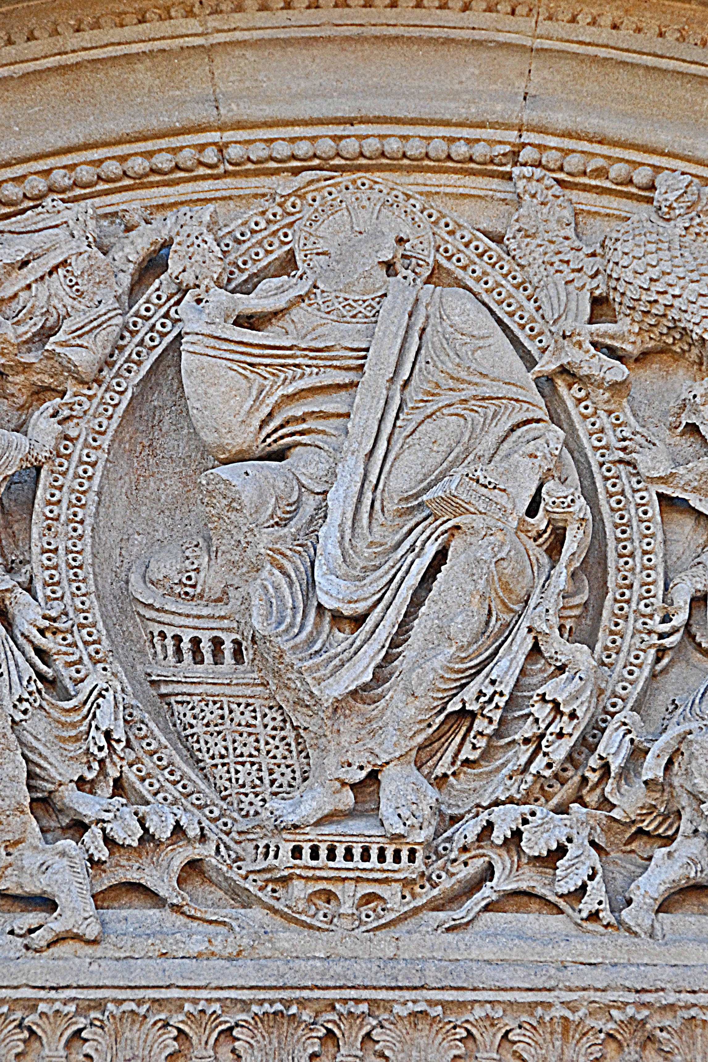 Großes Nordportal, Christus in Mandorla